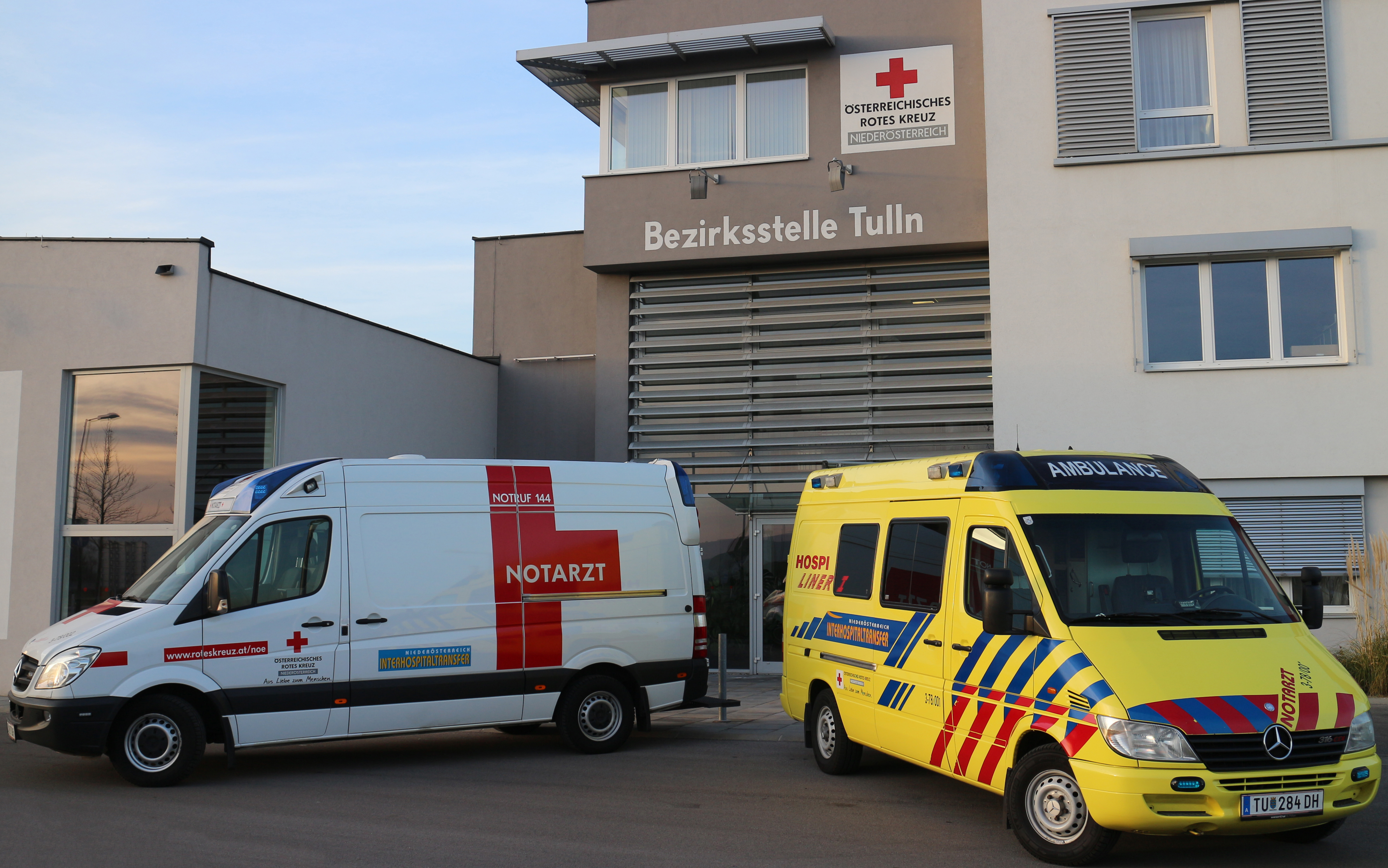 Zwei Intensivtransportwagen des Interhospitaltransfer Niederösterreich vor der Bezirksstelle des Roten Kreuz Tulln